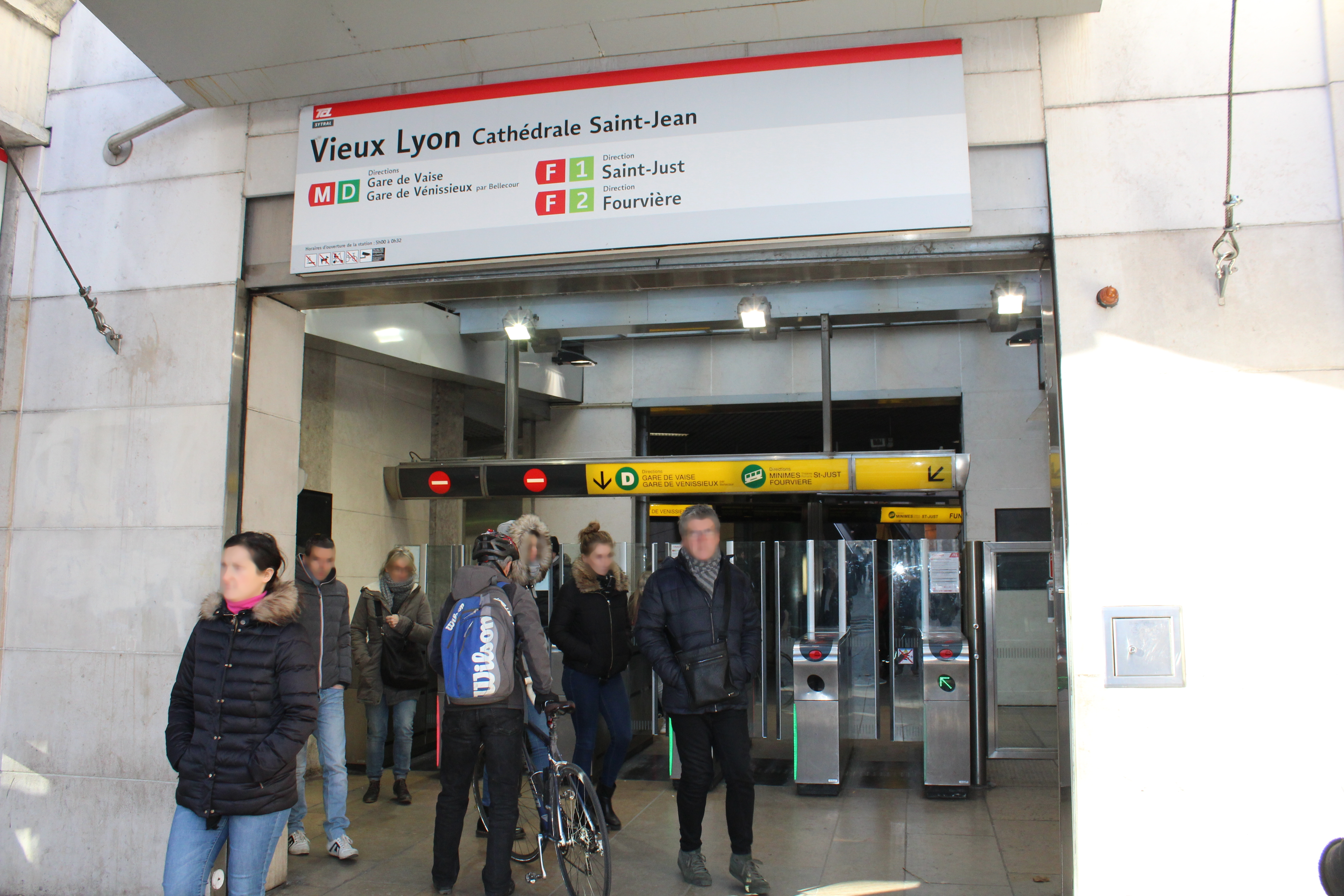 Entrée de la station Vieux Lyon - Cathédrale Saint-Jean, métro de Lyon.